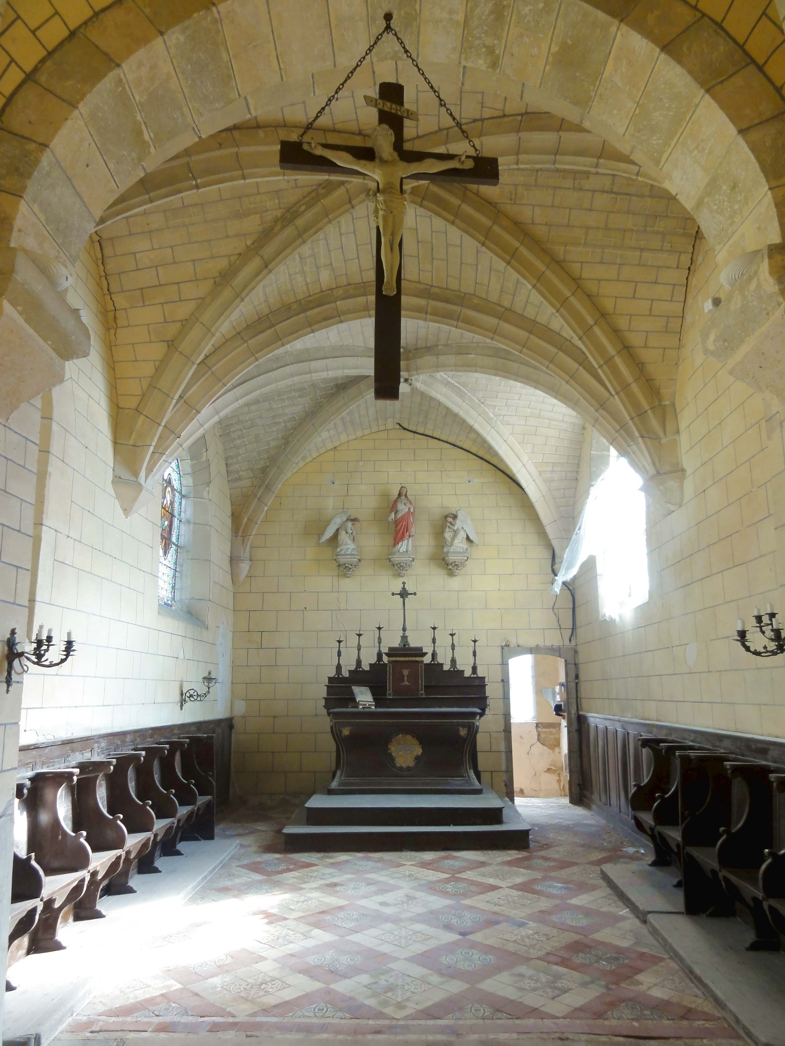 Intérieur de l'église - voir titre.